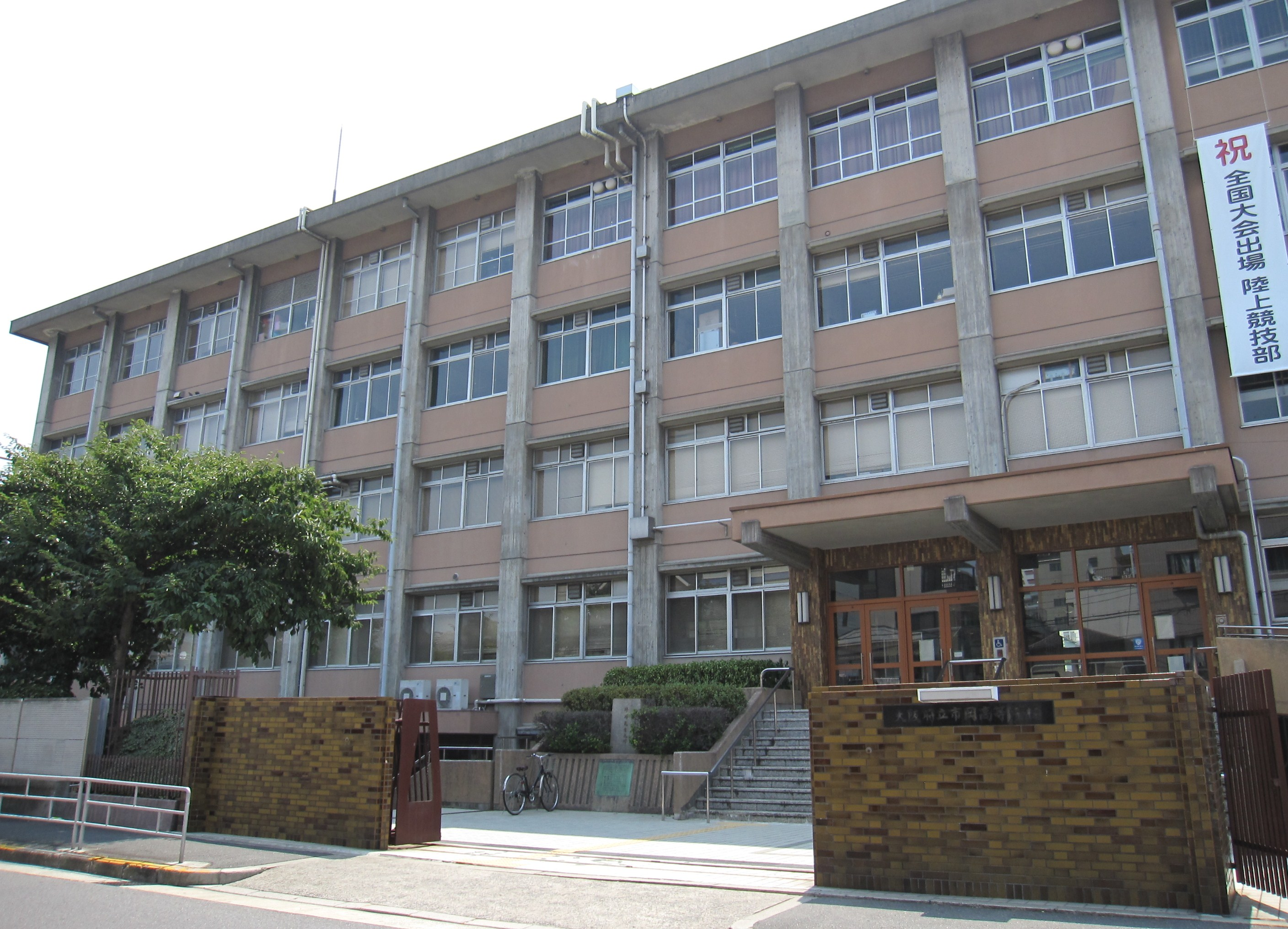 大阪府立市岡高等学校